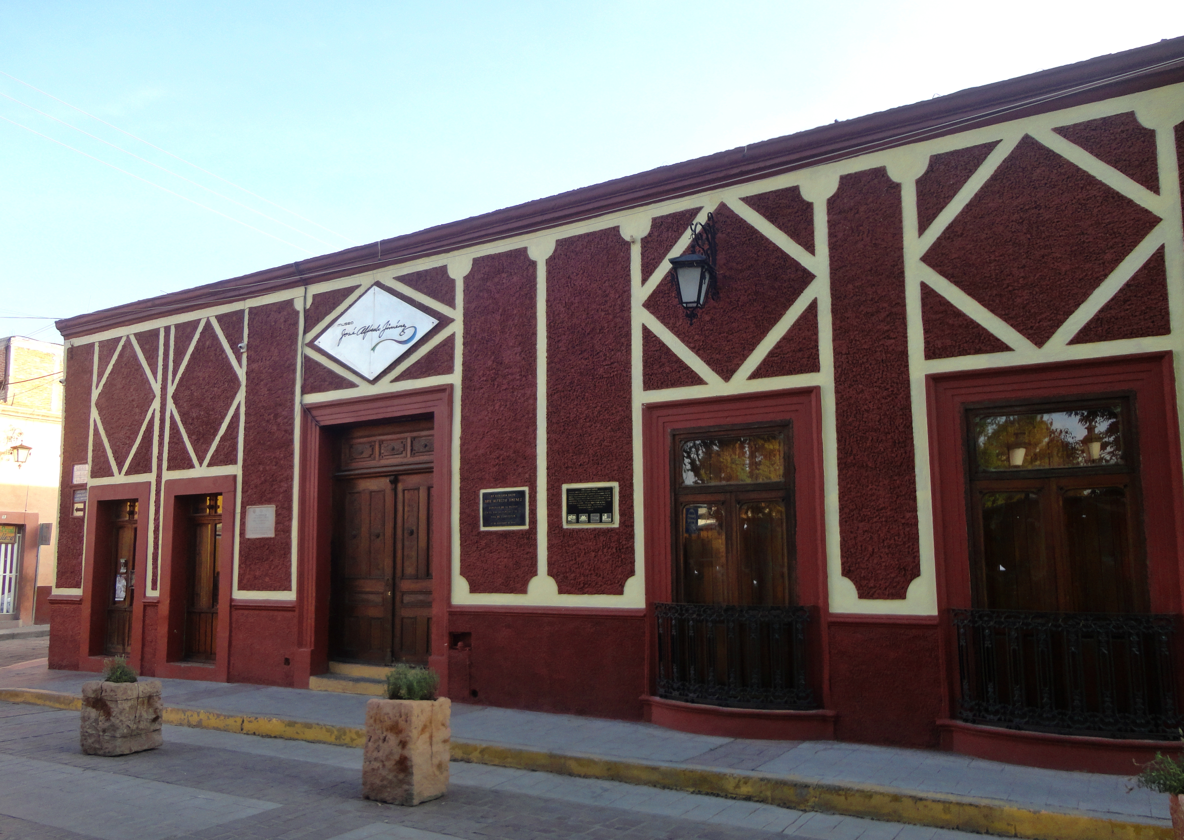 Casa de José Alfredo Jiménez, Dolores Hidalgo, Guanajuato, México.